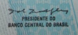 Assinatura do economista Pedro Sampaio Malan em nora de um Real de 1994.